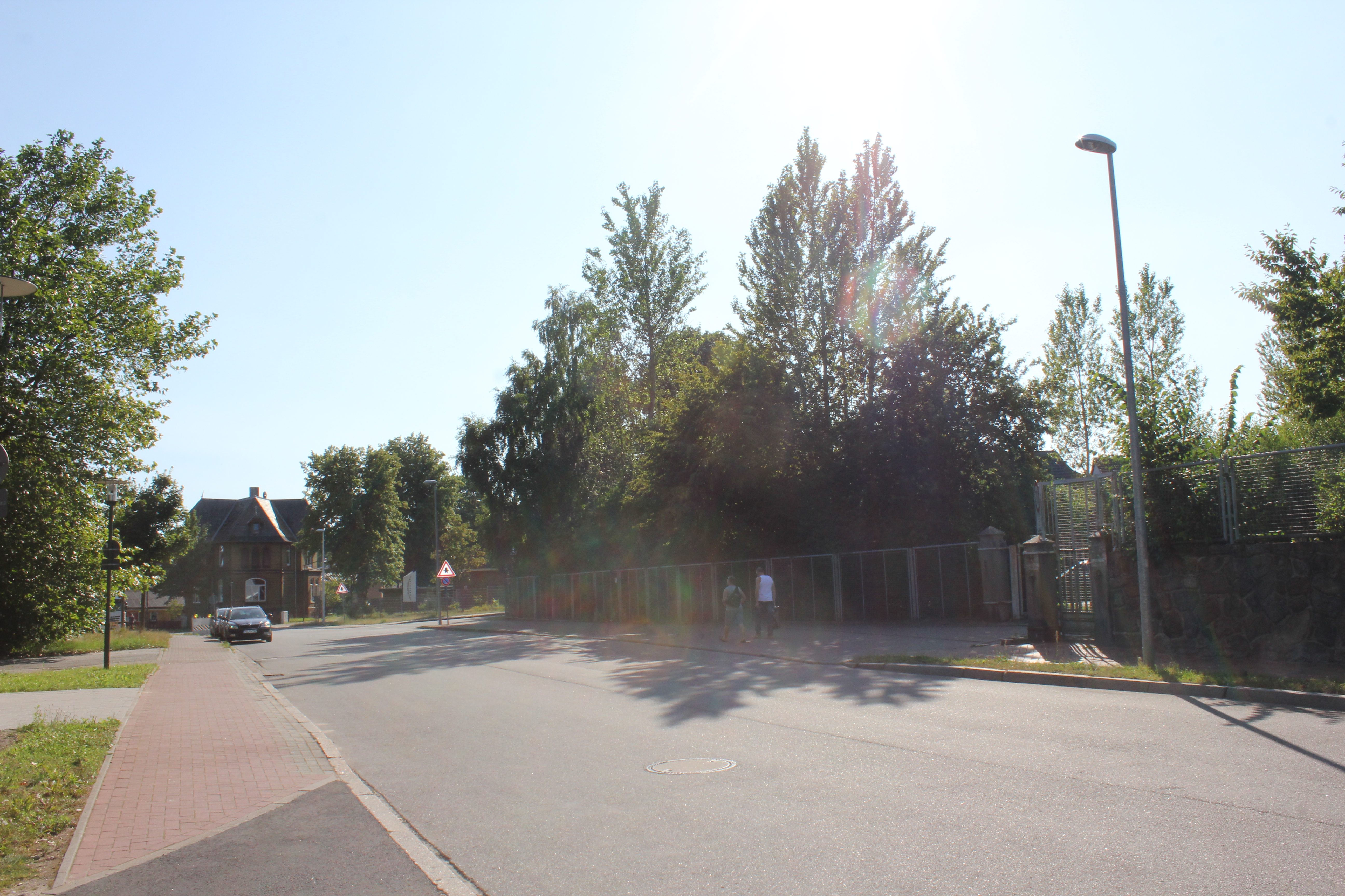 Batteriestr Nr. 33, (Ecke Trollseeweg), wo Nordische Fischkonservenfabrik u Moin Moin waren, das Gelände rechts im Bild (Flensburg 2014)